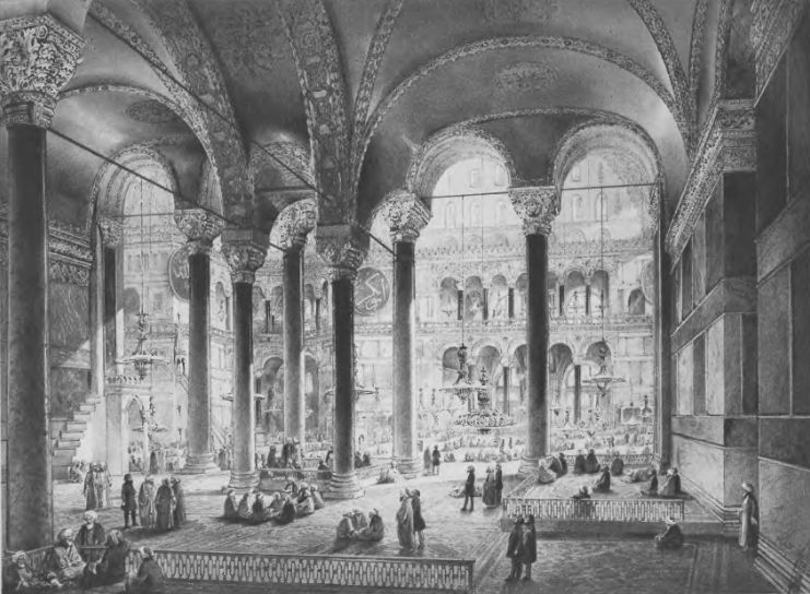 Центральный вид северного нефа собора Святой Софии в Константинополе